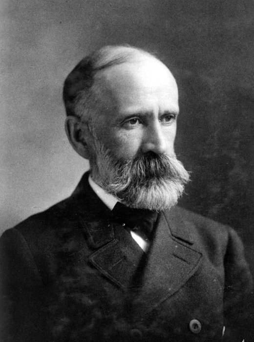 Israel Russell late in life, circa 1900